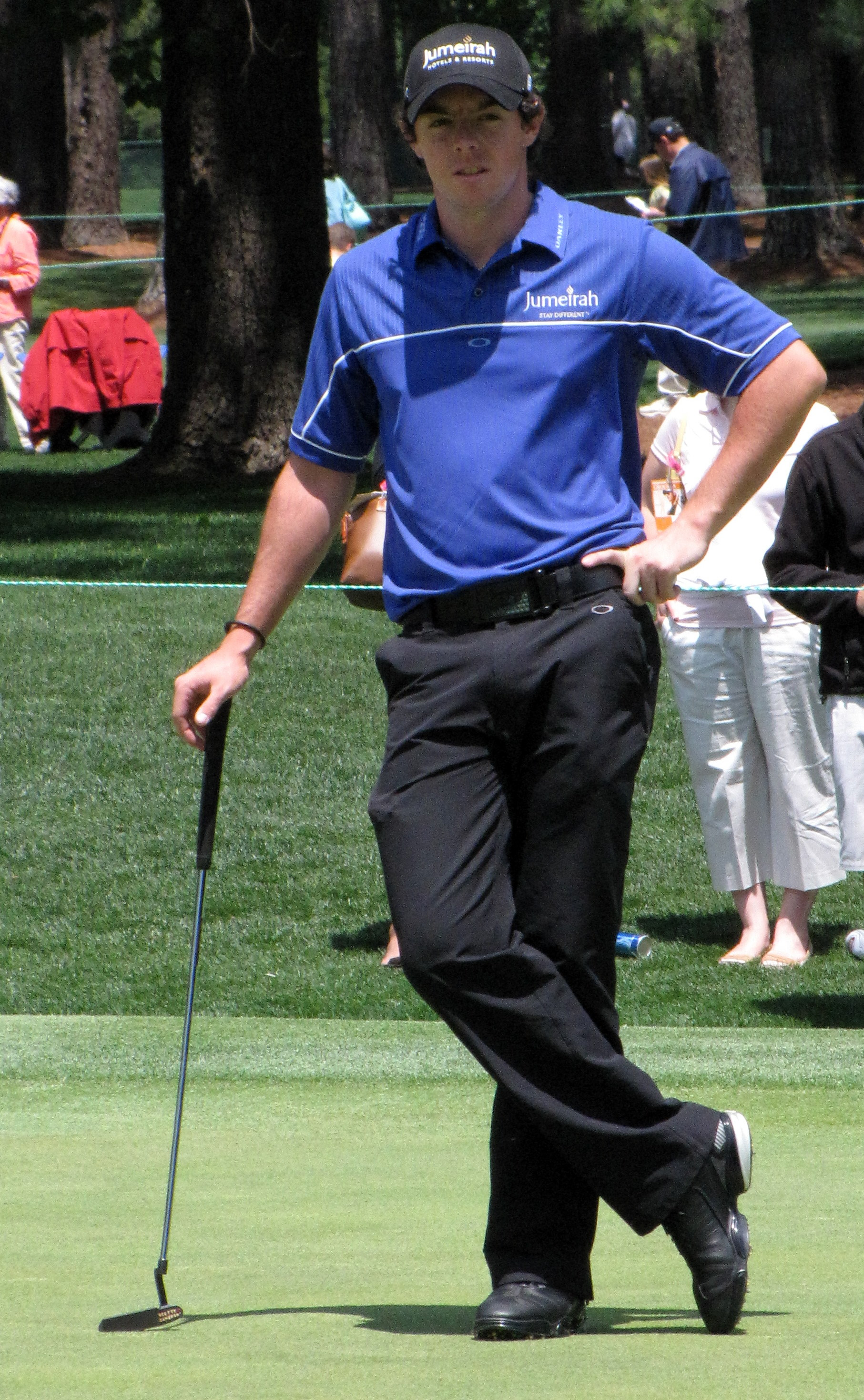 Fotografie Roryho McIlroye na turnaji ze série PGA Tour.